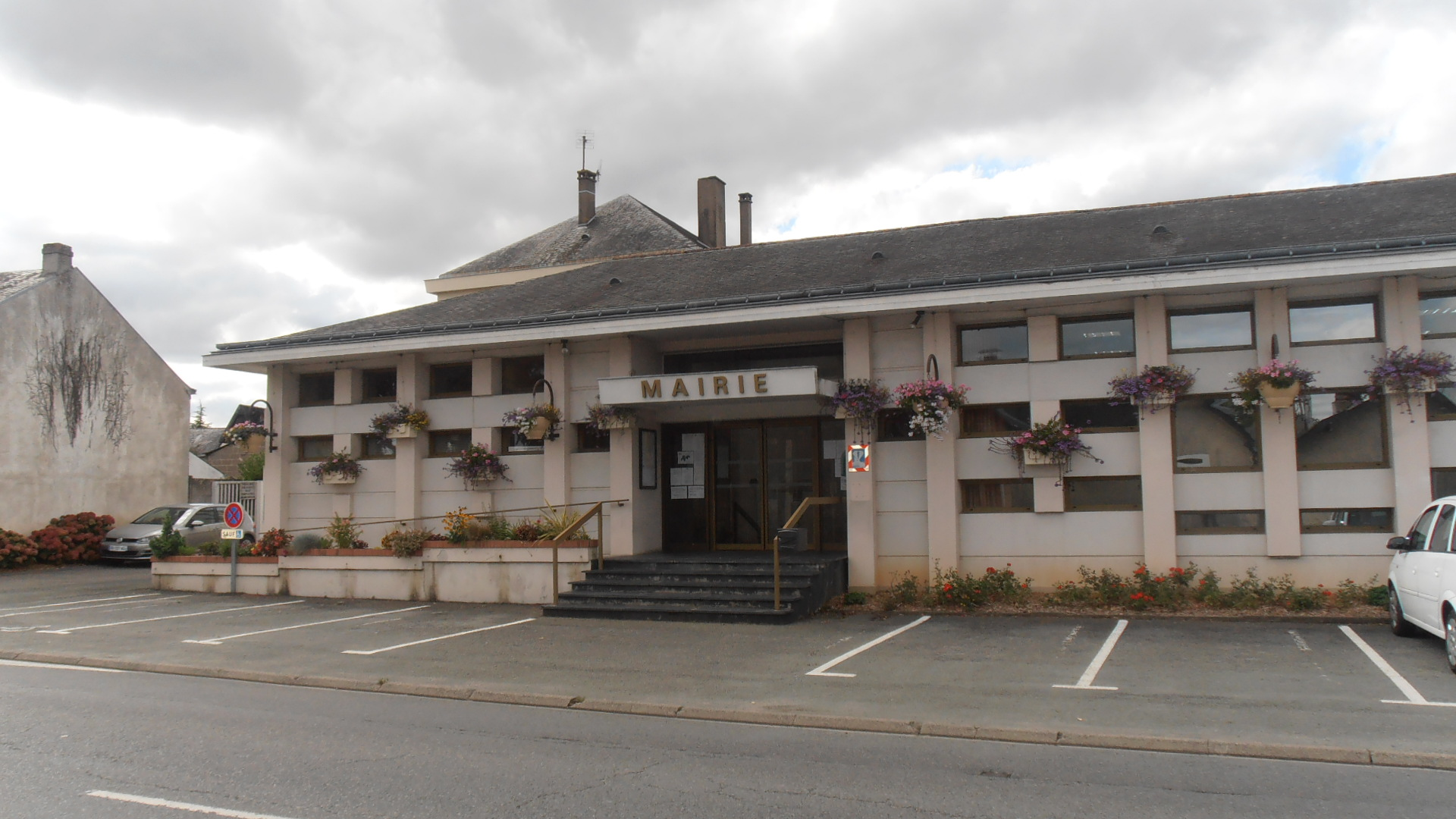 La mairie de Saint-Pierre-Montlimart (Maine-et-Loire, France).